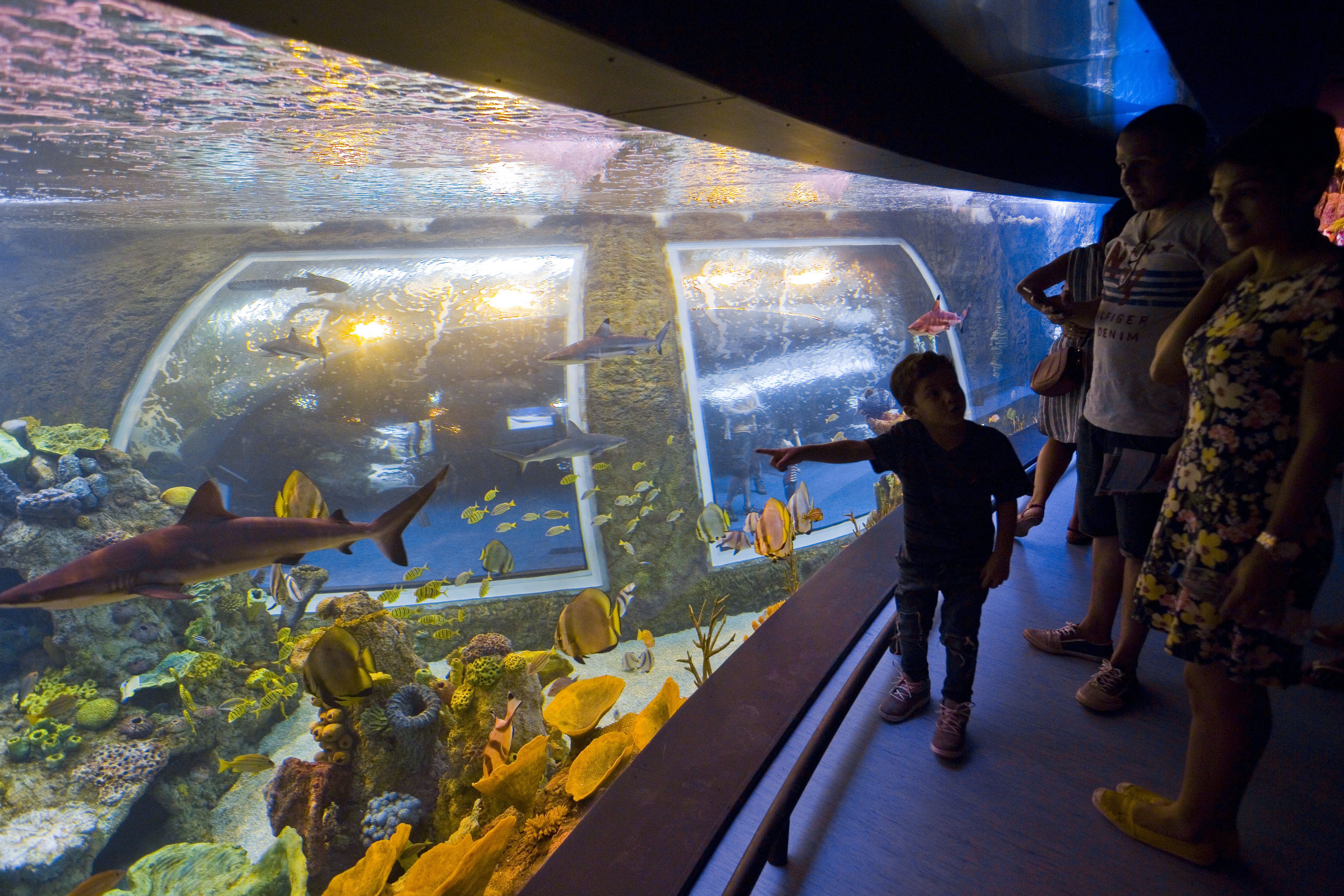 Uno de los acuarios que recrea el hábitat de los arrecifes de coral del Indo-Pacífico